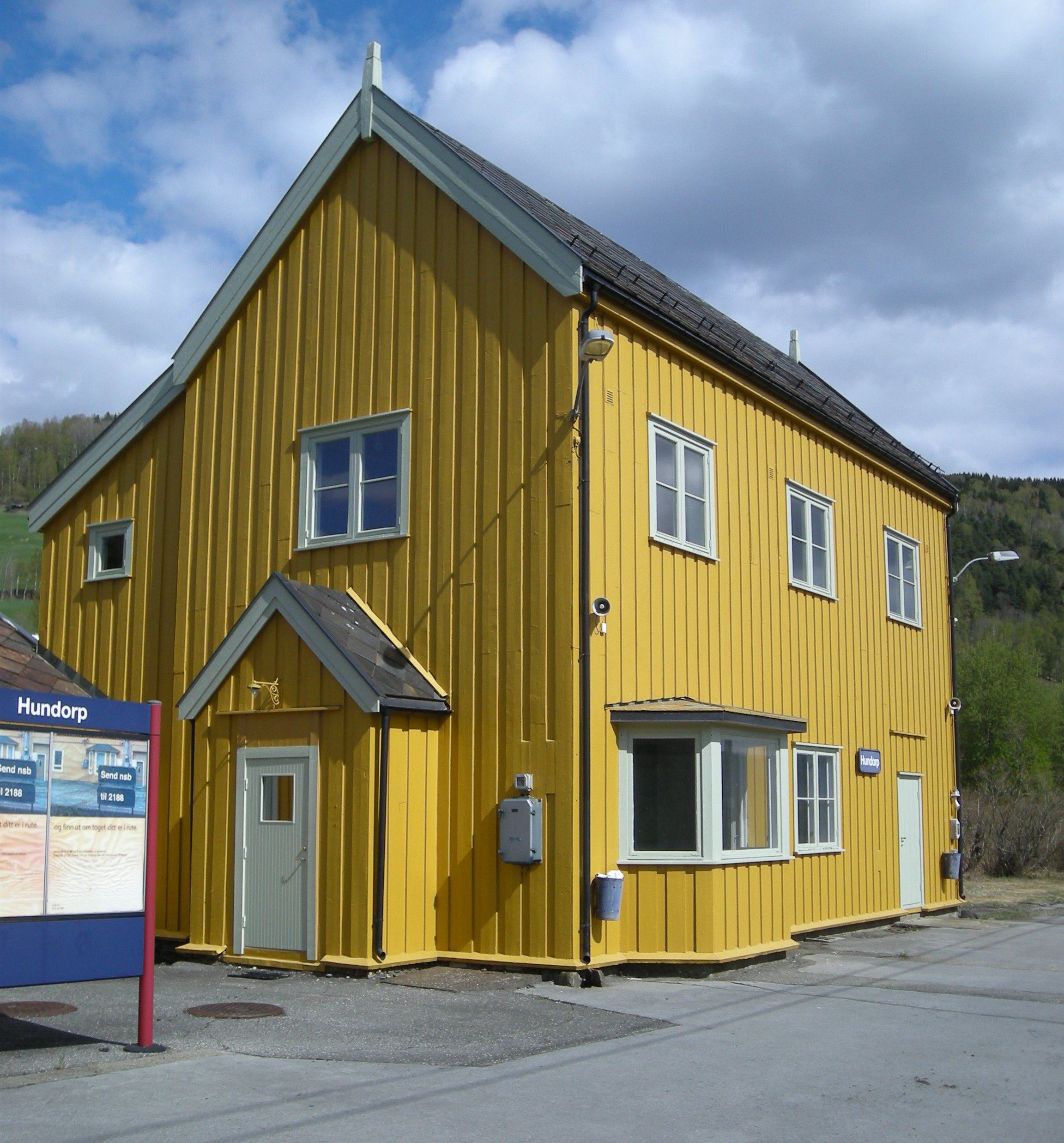 Hundorp stasjon på Dovrebanen